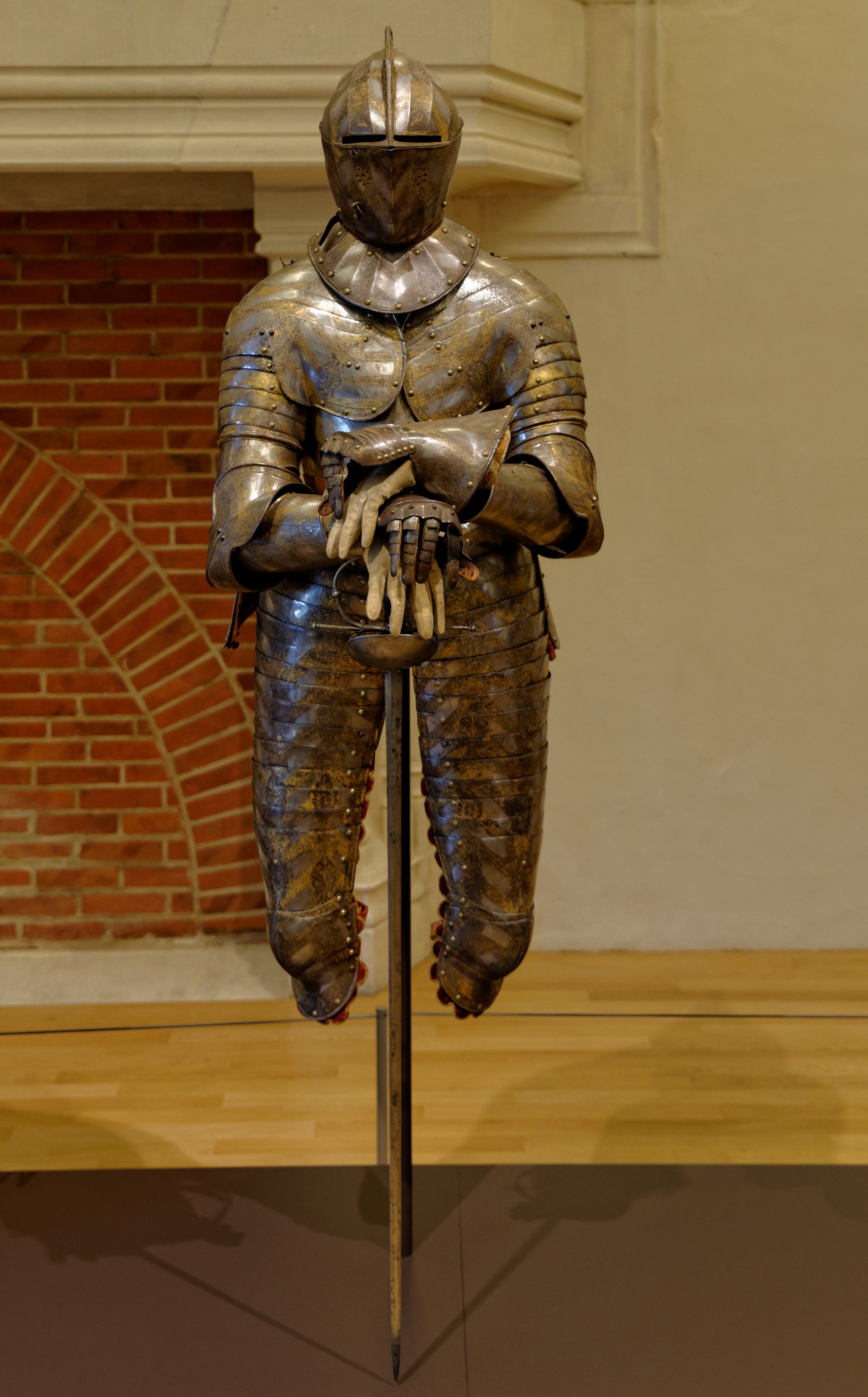 Armure du comte Jean de Saulx-Tavannes (1555-1630). Décorée de bandes ornementées, ciselées et dorées, sur un fond d'acier poli. Epée "à la française" France XVI eme siècle. Musée des beaux arts de Dijon (Côte d'Or, France).